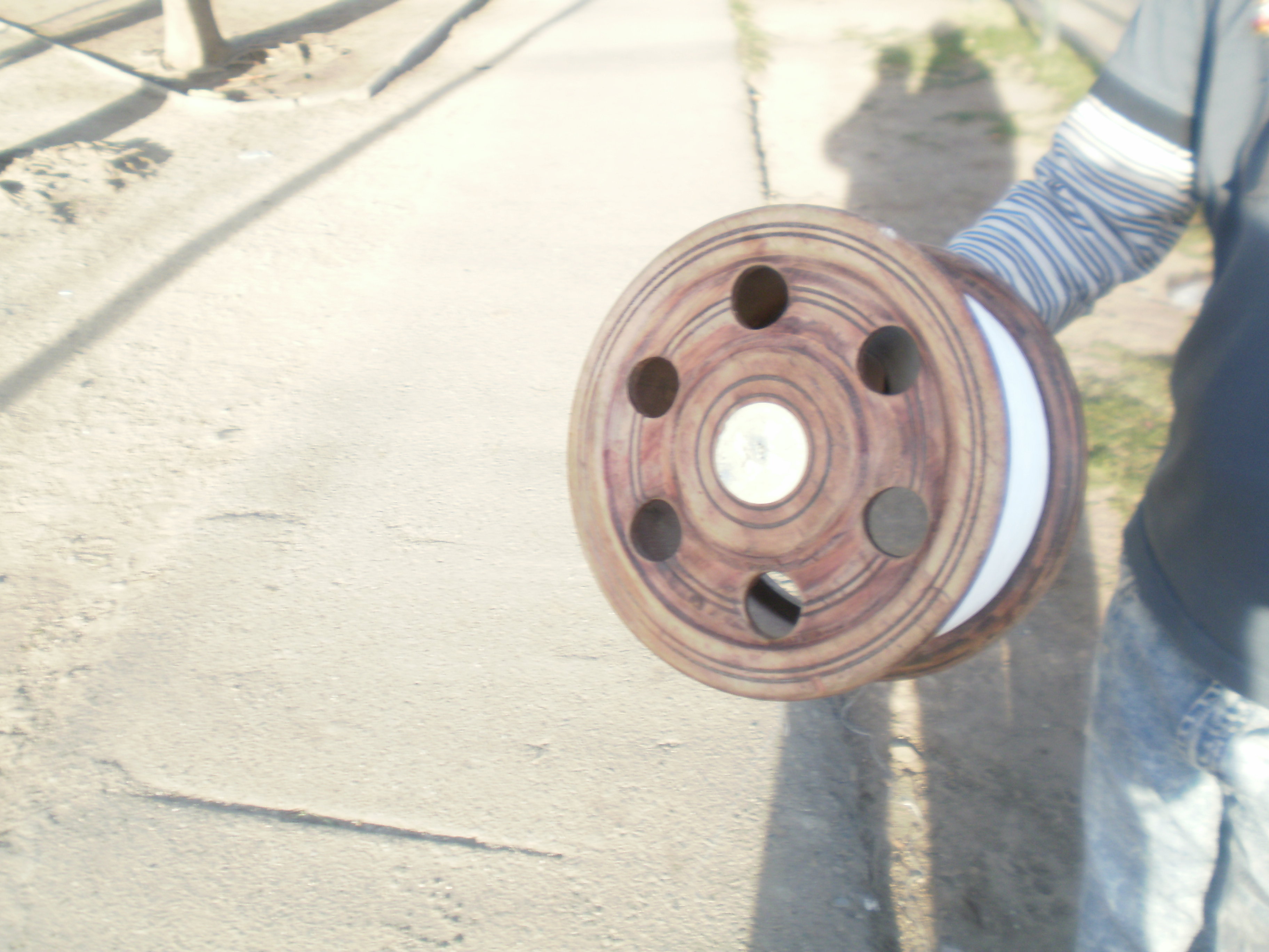 Carrete de hilo impregnado con vidrio o abrasivos para elevar cometas (volantines) y cortar en el aire los hilos de los cometas adversarios.